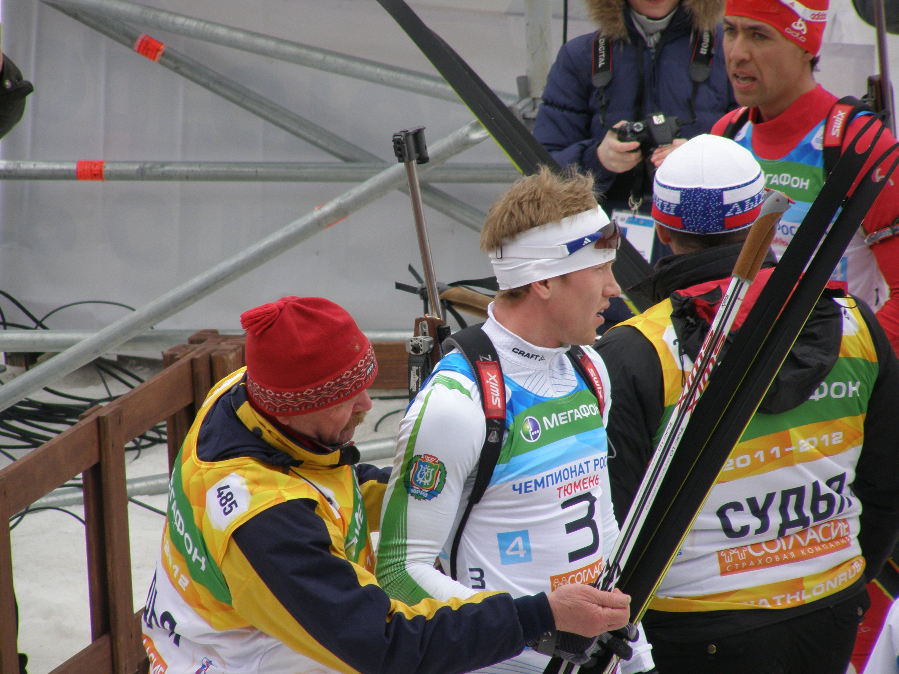 Ĉapmionkonkurso de Rusio pri Biatlono - 2012. La biatlona centro "Ĵemĉuĵina Sibiri" (Perlo de Siberio), Tjumena distrikto, Tjumena provinco, Rusio.